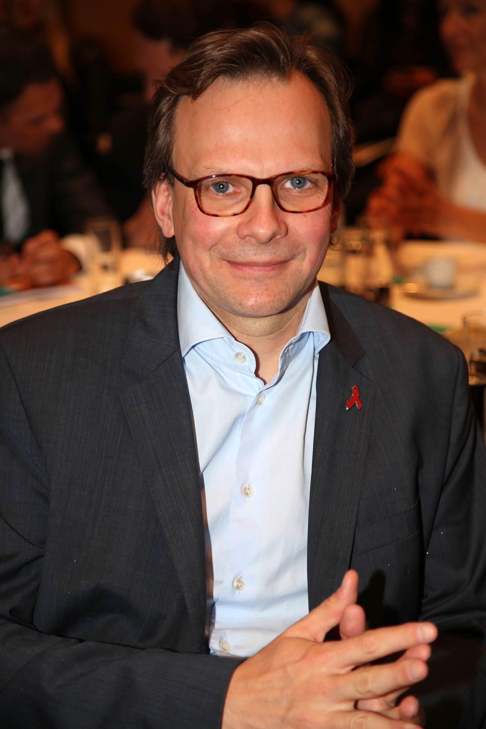 Bierwirth_Andreas-T-Mobile-3612